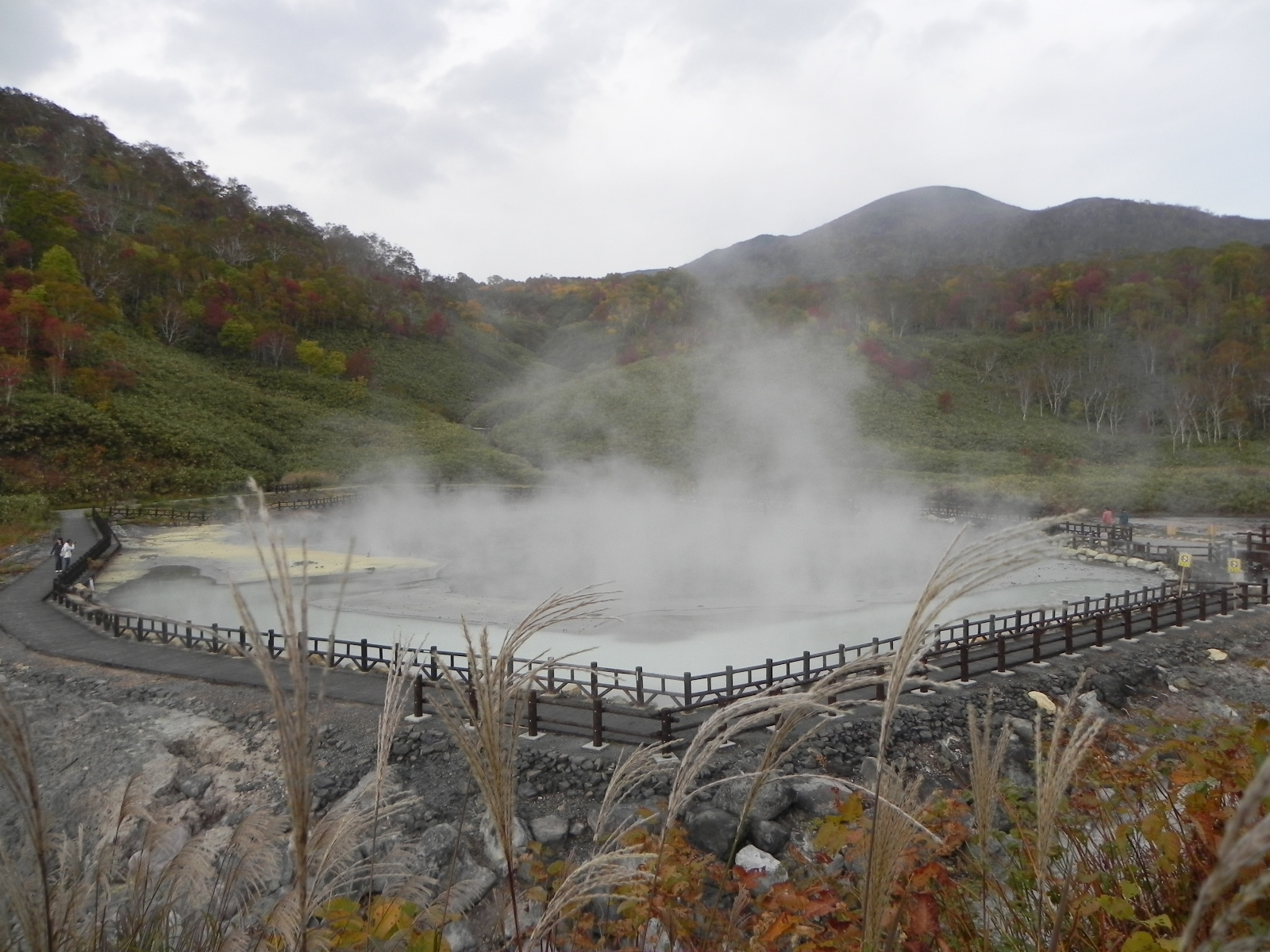 煮えたぎる泥の沼（Mud springs）